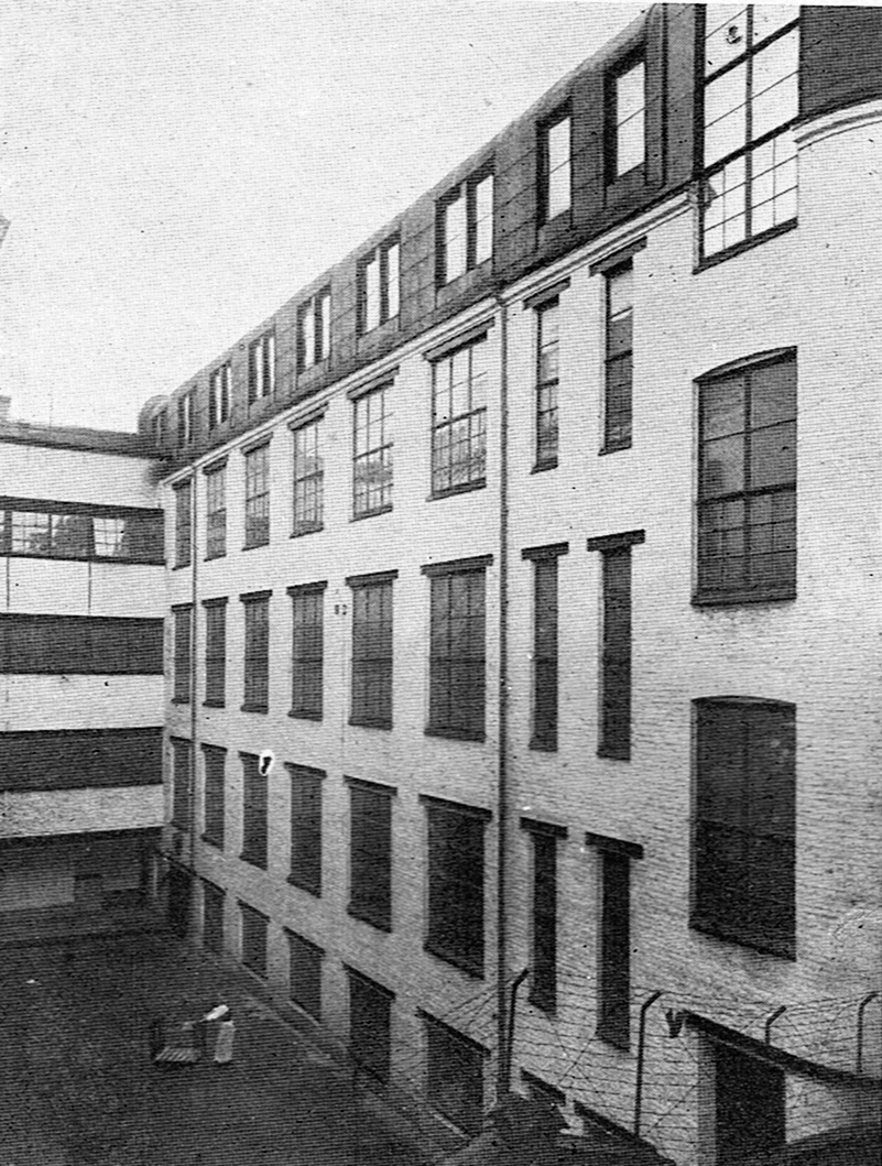 Nordiska Linnefabriken. Factory Building, Göteborg